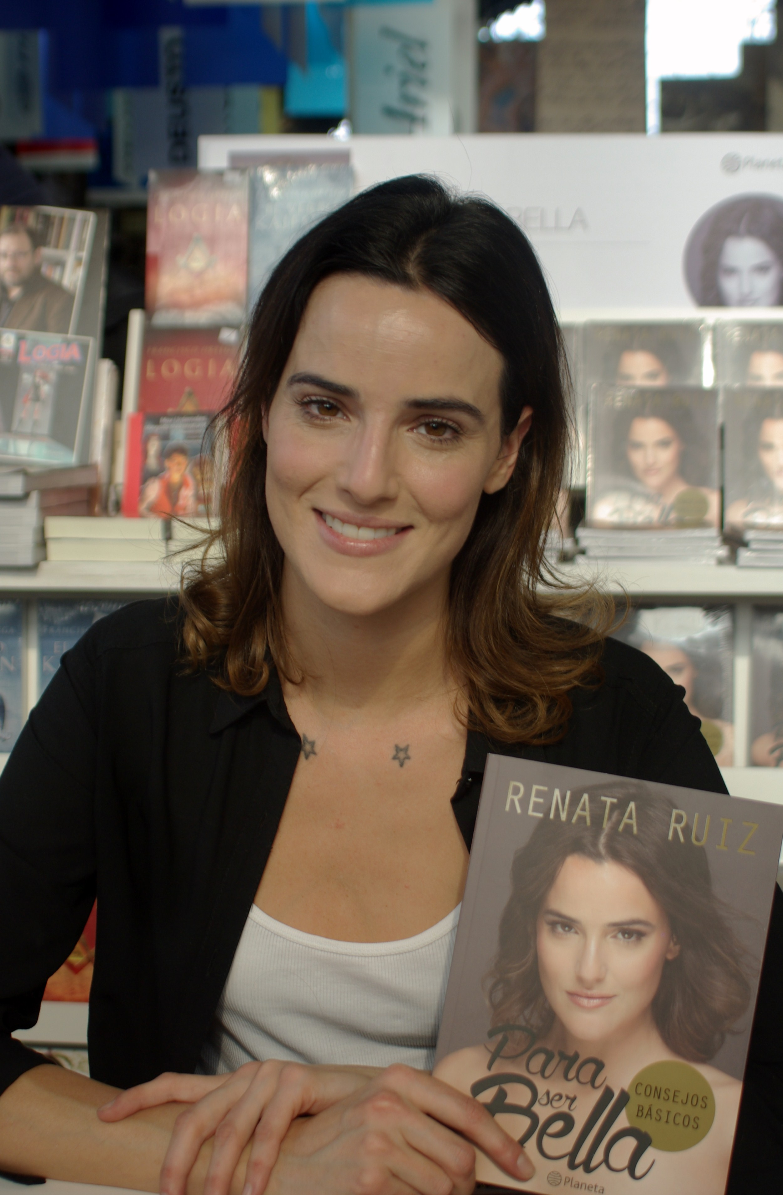 La modelo chilena Renata Ruiz en la Feria Internacional del Libro de Santiago 2015